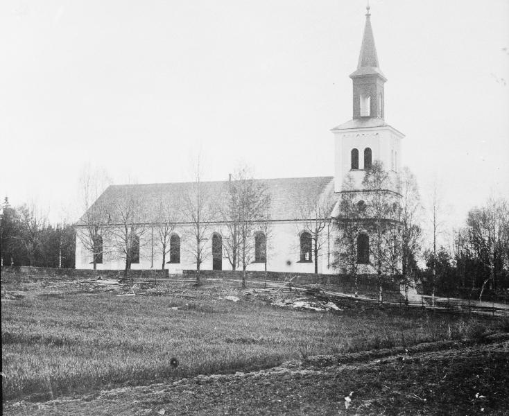 Kyrkan mot nordväst. Kategori: (01) ExteriörerKyrkan mot nordväst.